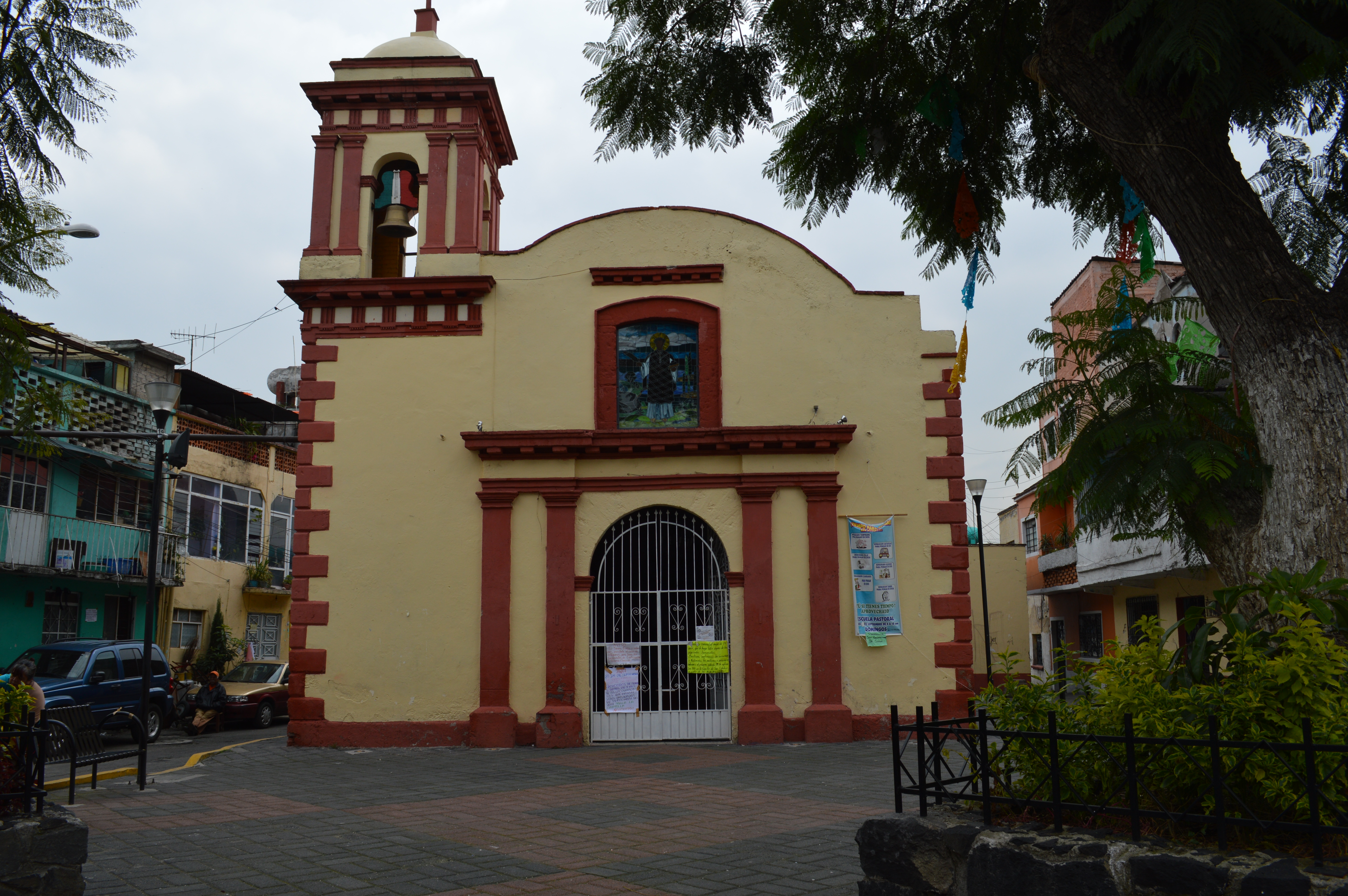 Fachada de la Capilla de San Esteban Mártir, ubicada entre las calles Dalia y Plaza San Esteban, en delegación Xochimilco, Ciudad de México, México.